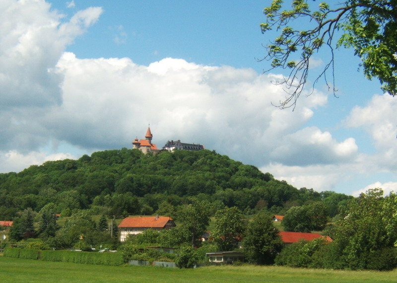 Die Veste Heldburg in Südthüringen